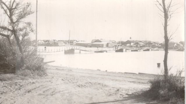 Красногорск, Сахалинская область, Центр, вид на пешеходный мостик (бон) через реку Чёрную, 60-е годы XX века.